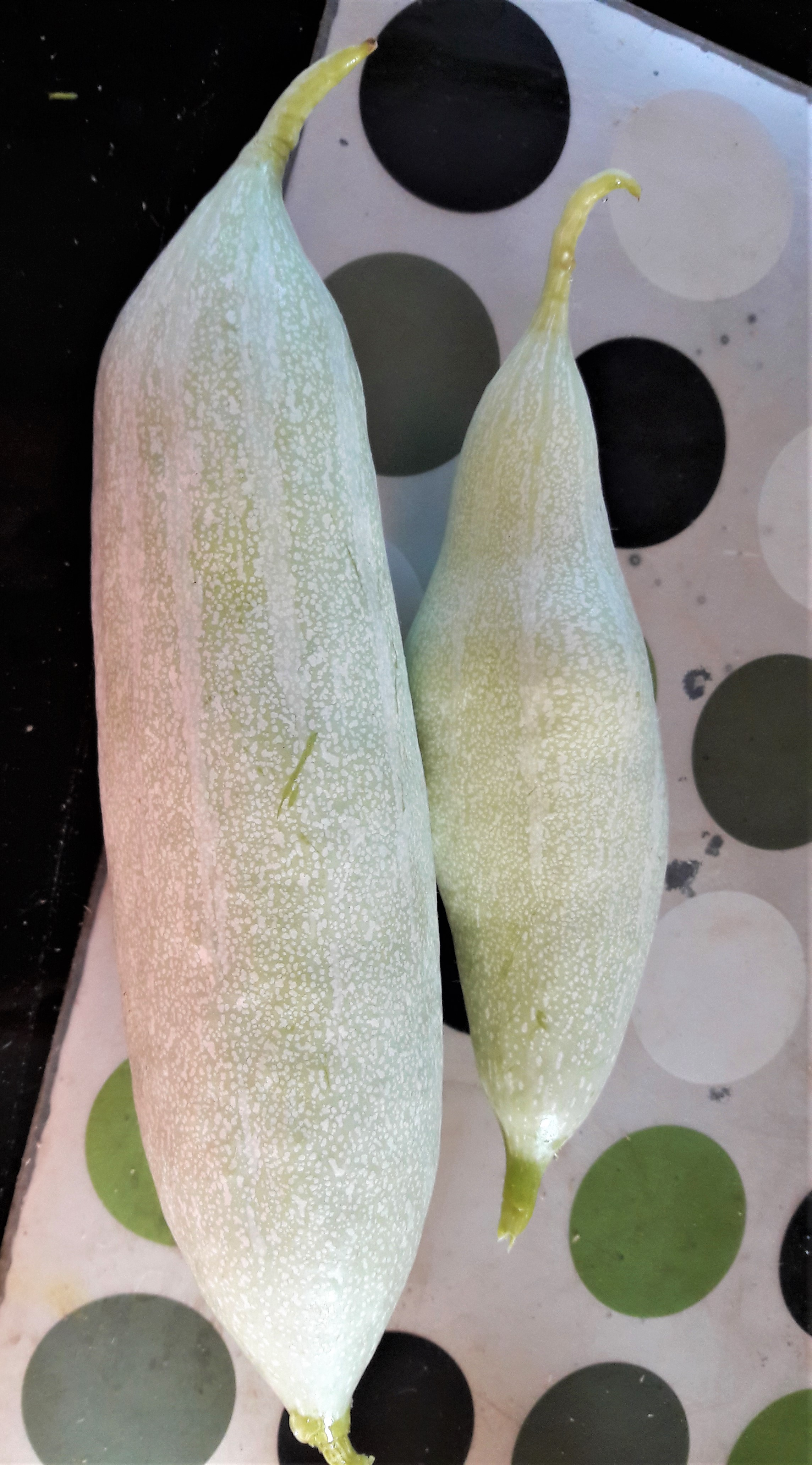 పెరటి పిచ్చుక పోట్లకాయలు